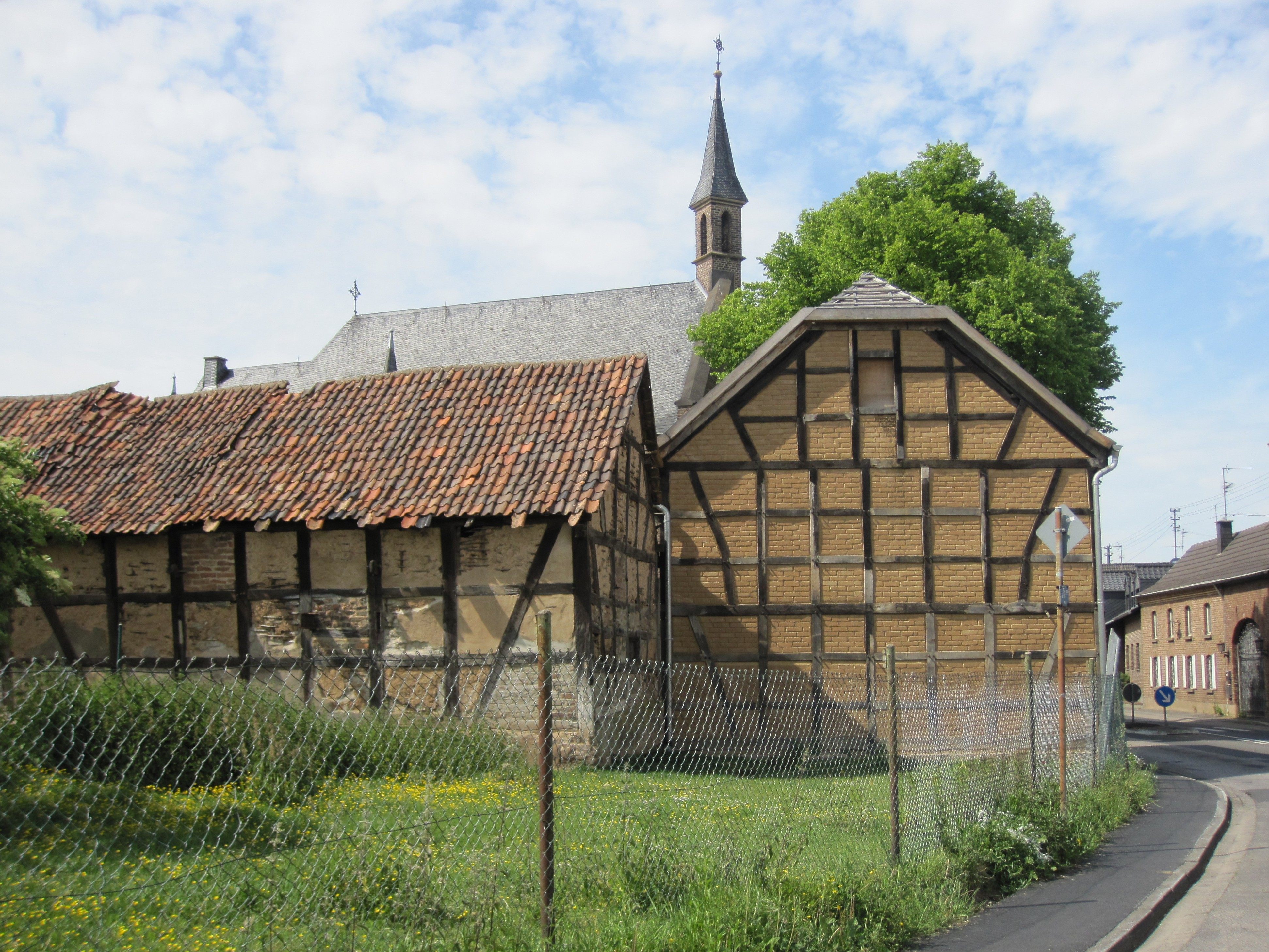 Ahrem Gennerstraße von Süden